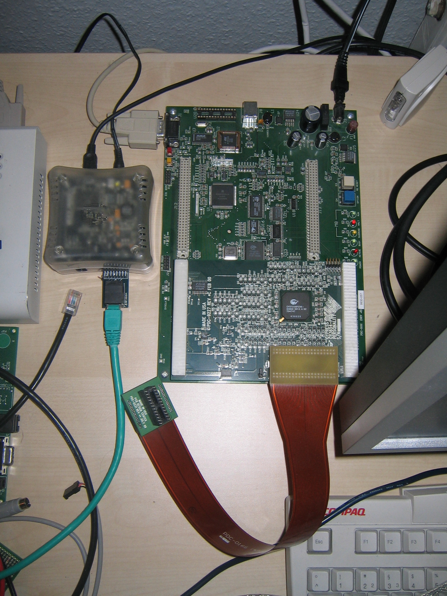 In Circuit emulators made by Cypress. To the left is the ICE Cube which is a recent version supporting the PSoC family, the right one is the CY3654 with a personality board for EnCoRe M8 based USB controllers.